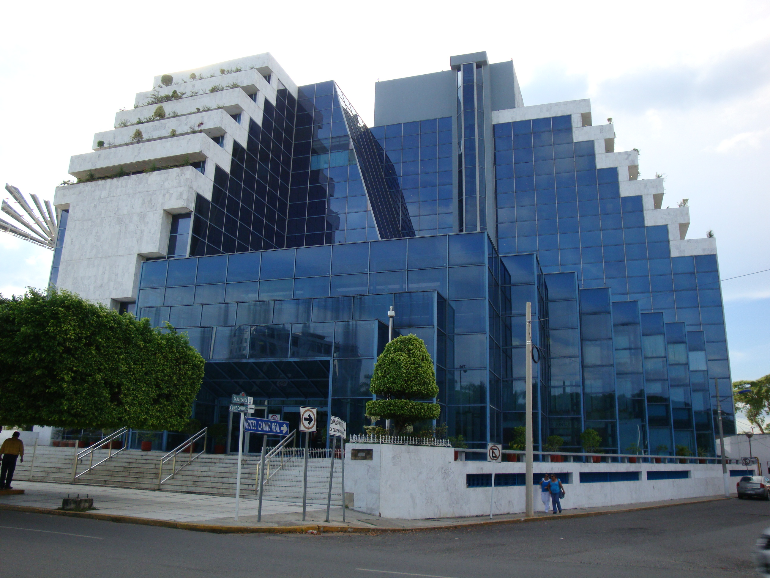 Edificio conocido popularmente como "Pirámide de Pemex" en donde se localiza la subsidiaria PEMEX Exploración y Producción,(la subsidiaria de Pemex más importante) en la ciudad de Villahermosa, estado de Tabasco, México.